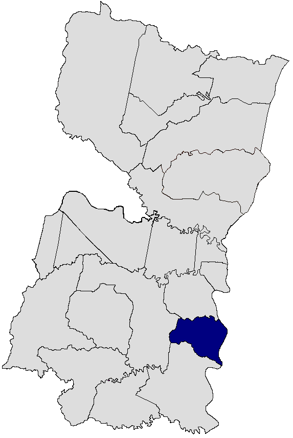 Mapa de Domingo Martínez de Irala